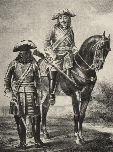 Кавалергардский литаврщик и Кавалергард в 1724 году.